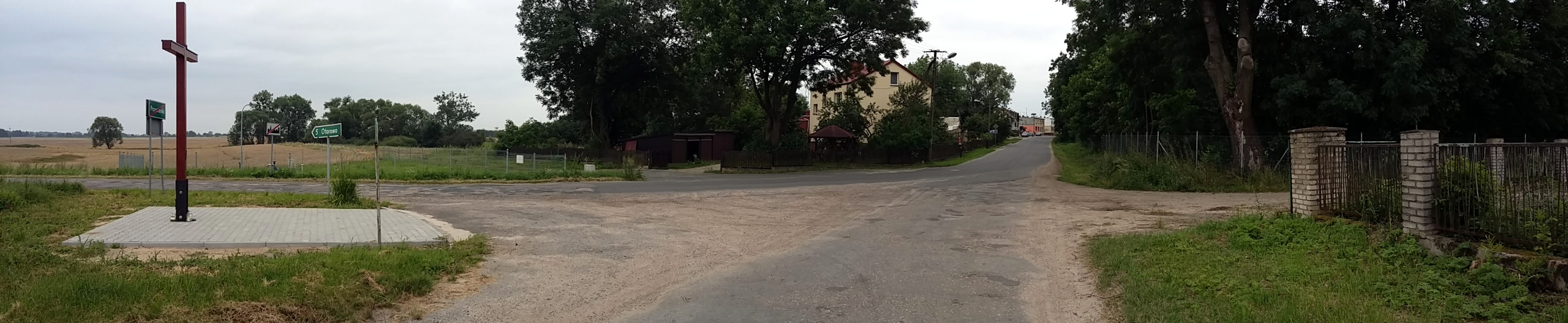 Widok wsi.